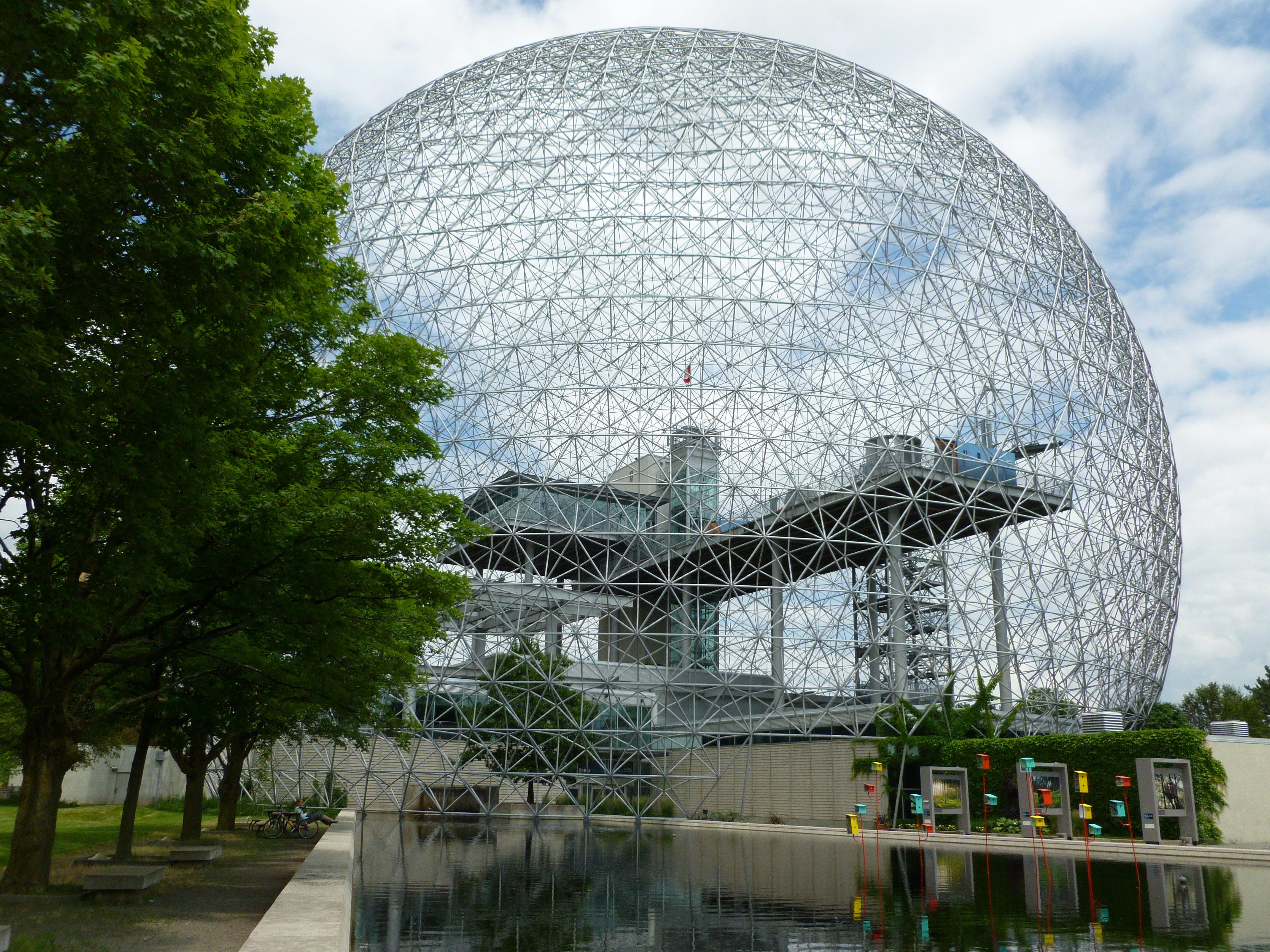 La Biosphère de Montréal, Québec, Canada.